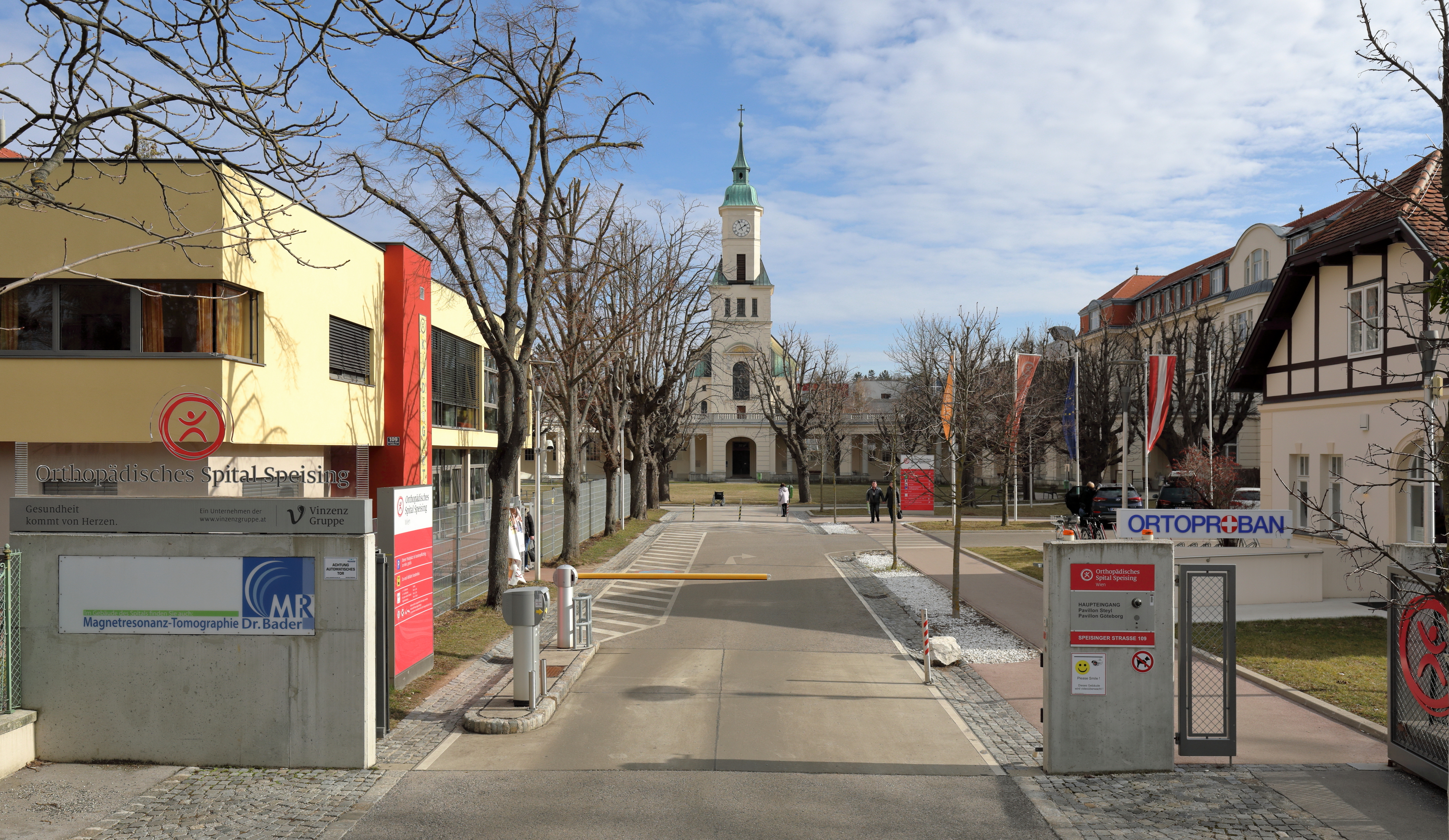 Der Einfahrtsbereich des Orthopädischen Spitals Speising im 13. Wiener Bezirk Hietzing.Ursprünglich ein von den Schulbrüdern von 1908 bis 1912 errichtete Waisenhausanstalt. Nach dem Anschluss an Deutschland wurde ihnen das Haus entzogen. Während des Krieges war es ein Reservelazarett für Nervenkranke und wurde schwer beschädigt. Danach wurde es zu einem Landeskrankenhaus für Niederösterreich ausgebaut. Nach dessen Verlegung nach Mödling übernahmen 1956 die „Steyler Missionsschwestern“ einen Teil (Ausnahme Kinderstation „Göteborghaus“, die erst 1969 nach Mödling übersiedelte) und zogen mit ihrem Orthopädischen Spital in der Gassergasse hierher. Seit 1999 gehört das Spital zur Vinzenz-Gruppe.